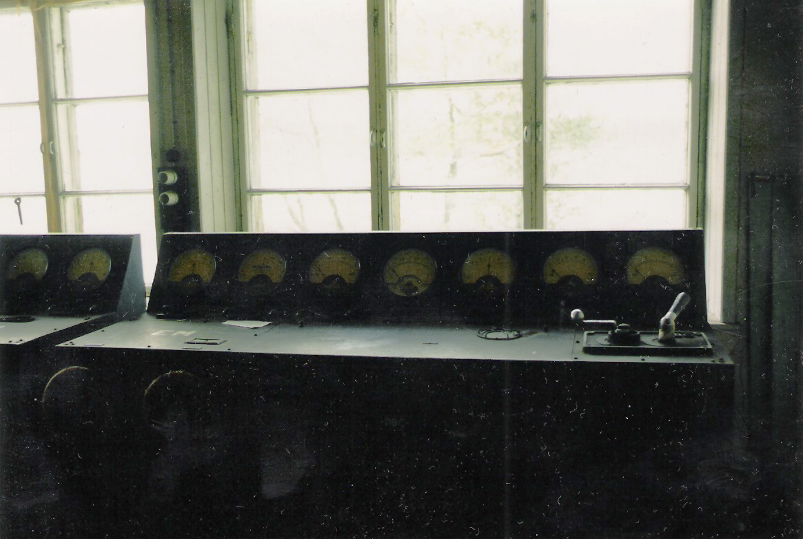 Lonnan saarella olevan magneettimiinojen torjunta-aseman ohjauspöytä.